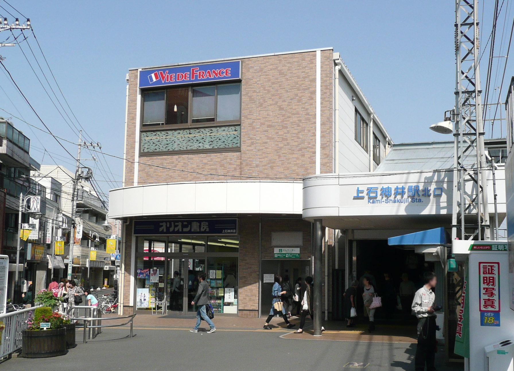 上石神井駅北口